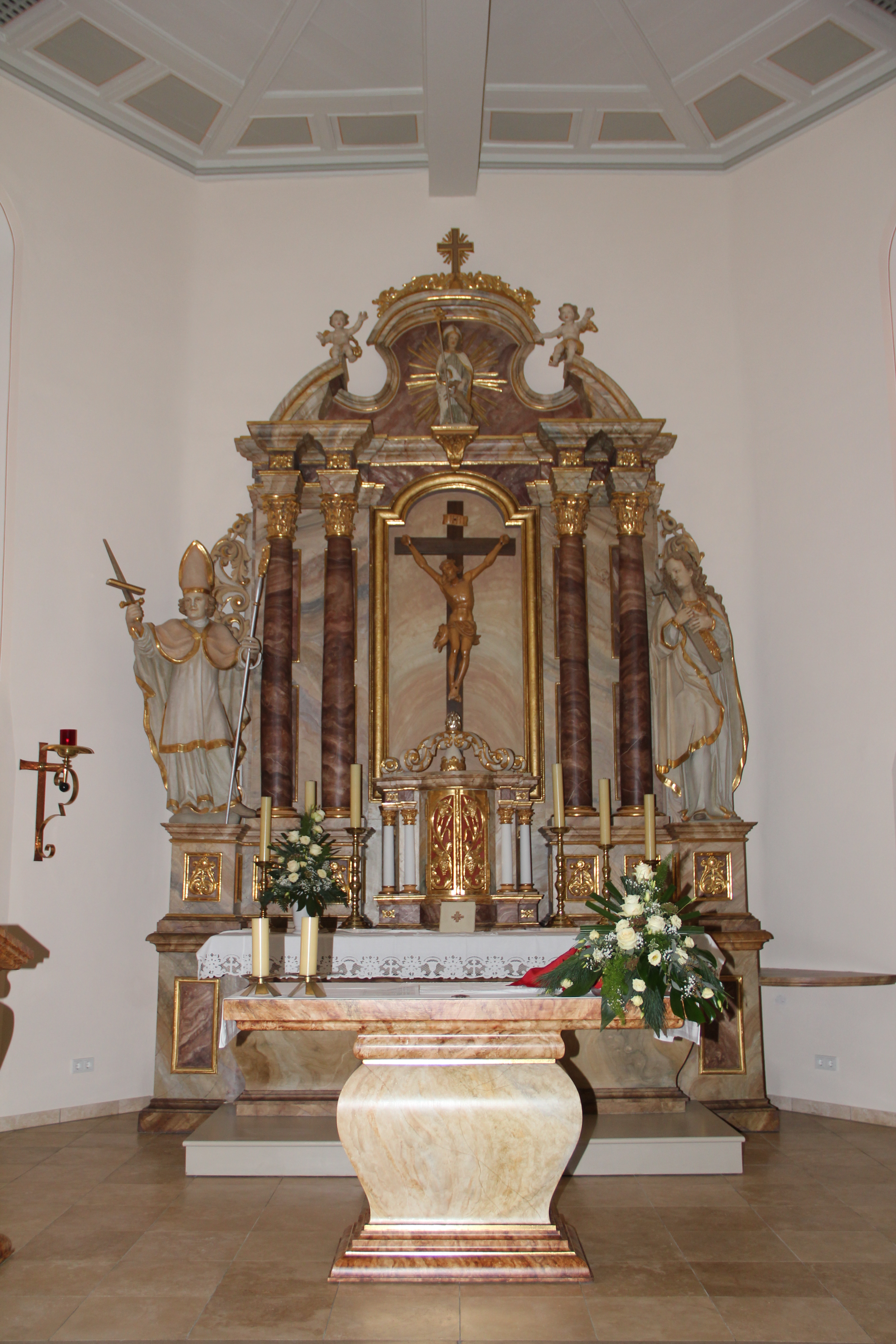 Chorraum der Kirche St. Aegidius in Marth